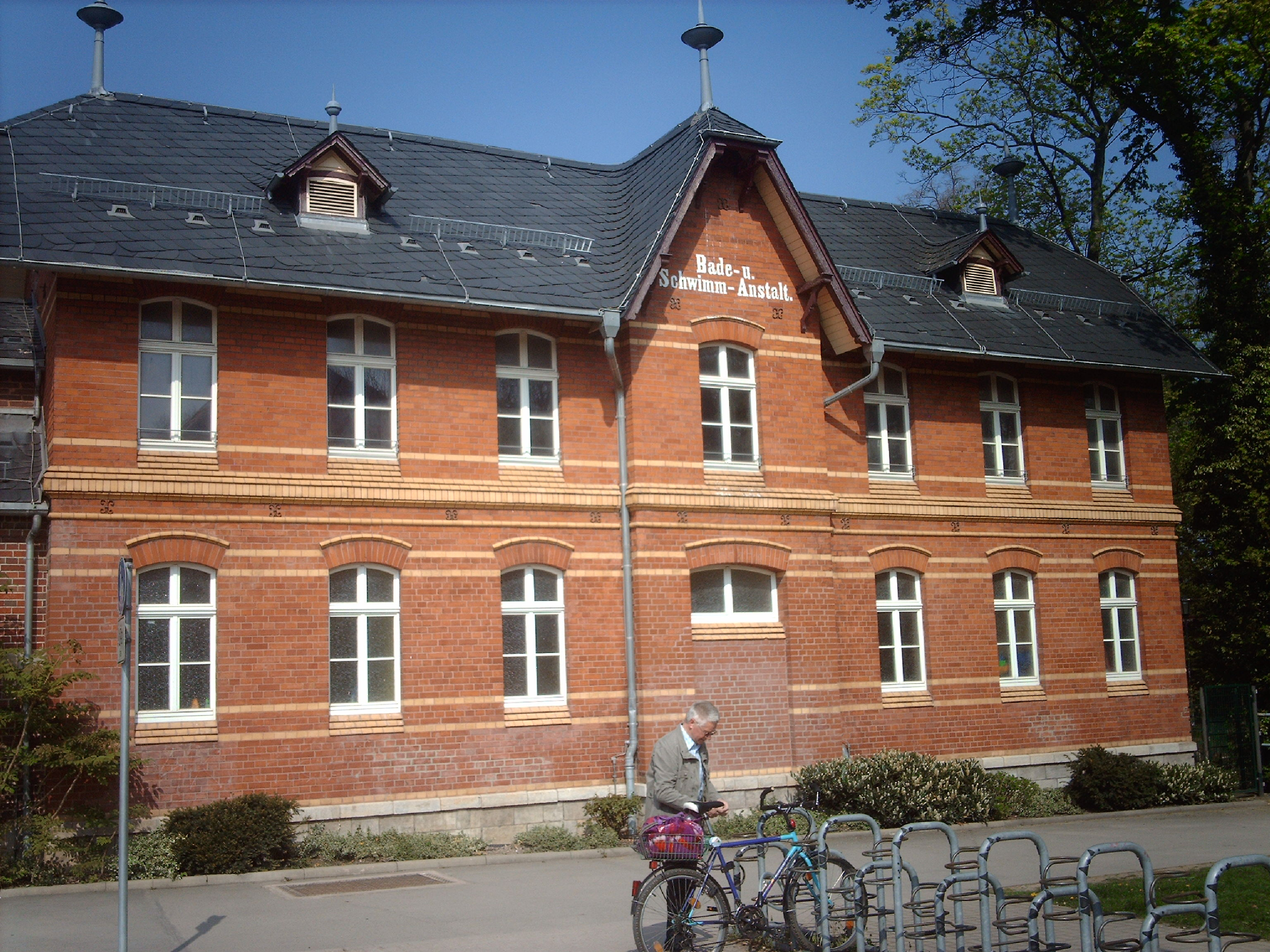 Schwimmbad in Arnstadt 1, Wollmarkt